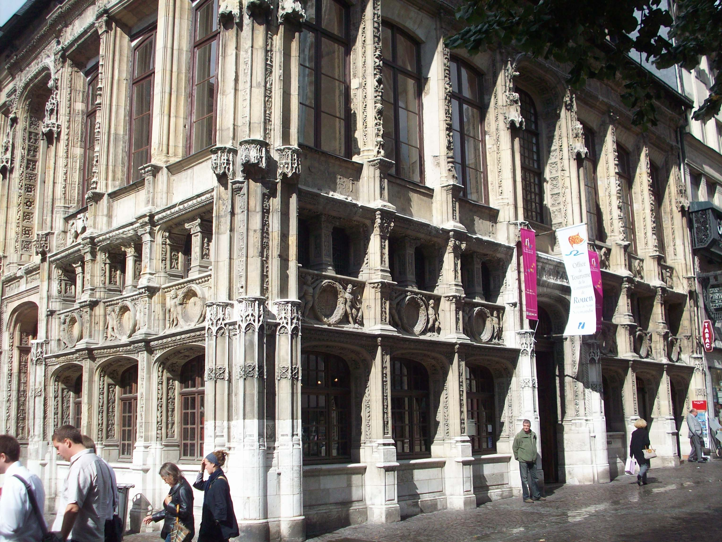 Détail sur la composition du bureau des finances.